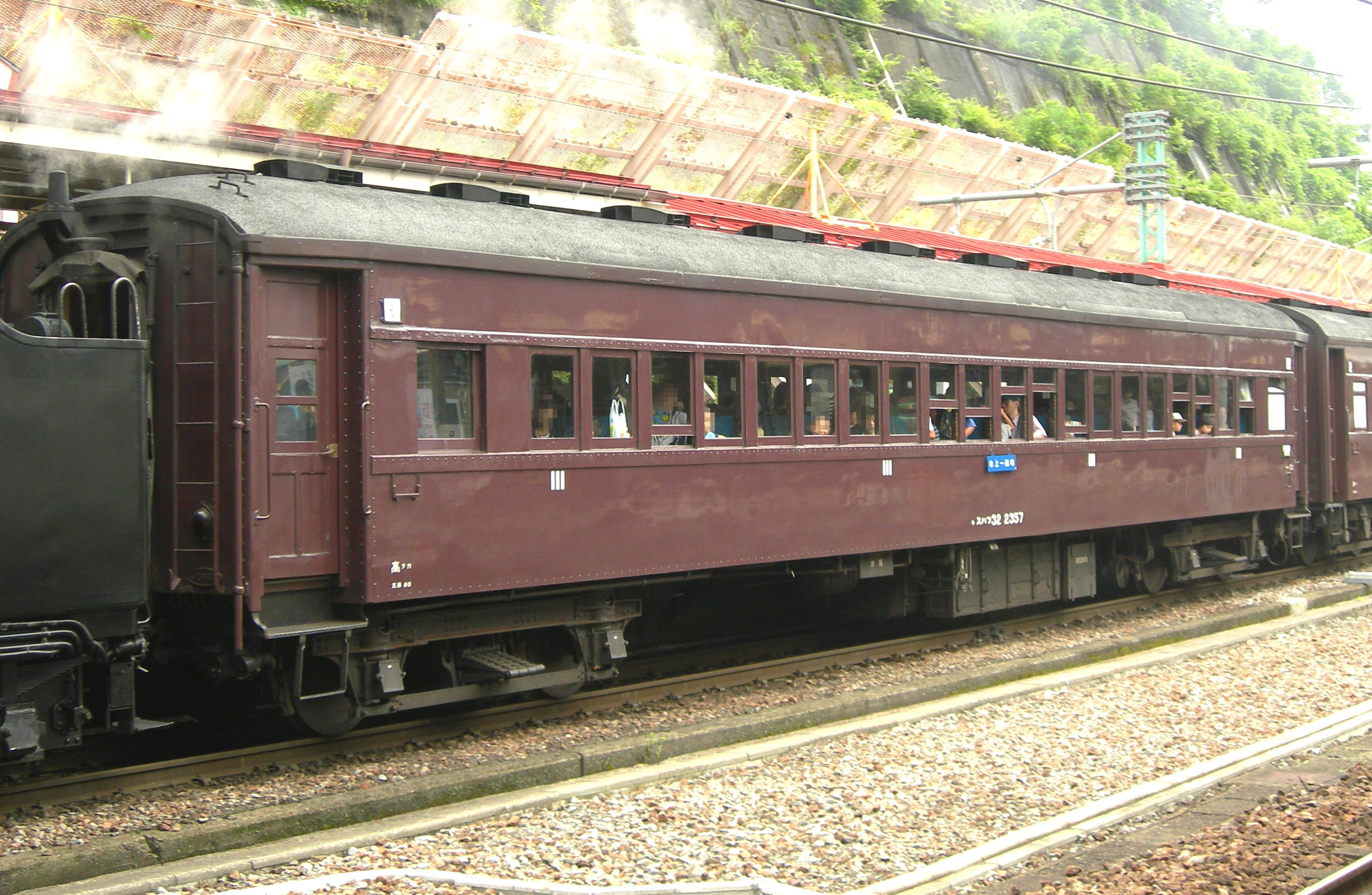 国鉄スハ32系客車 スハフ32 2357